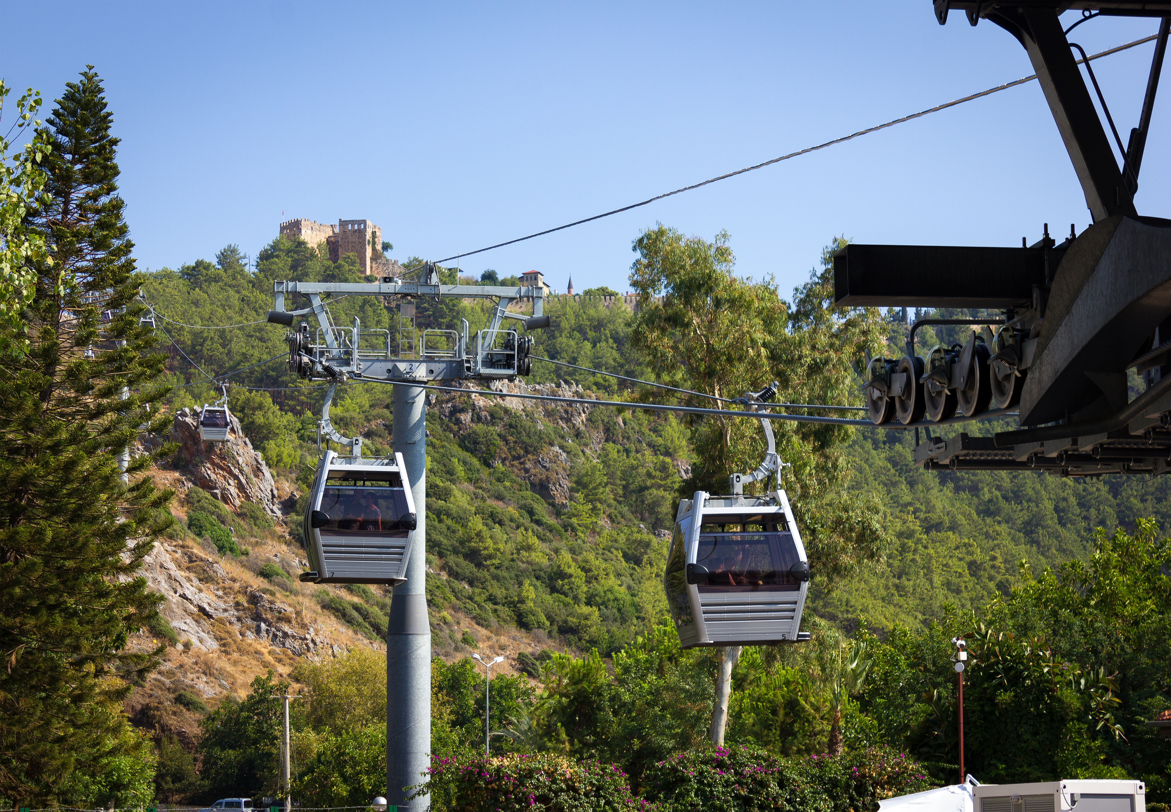 Канатная дорога в Аланье